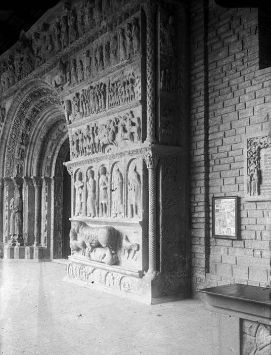 Imatge